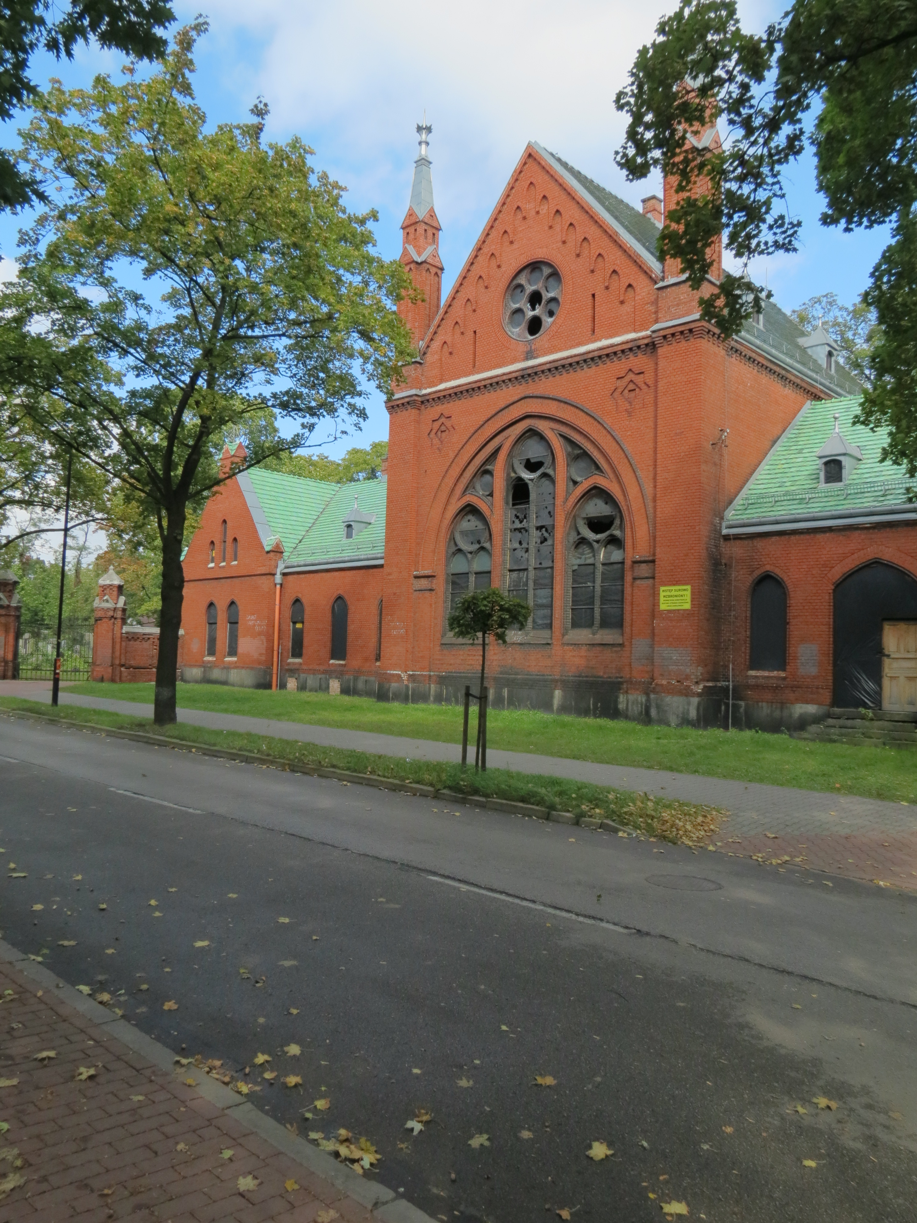 Gliwice, ul. Poniatowskiego 14 - Dom Przedpogrzebowy zwany Małą Synagogą (zabytek nr A/87/03)